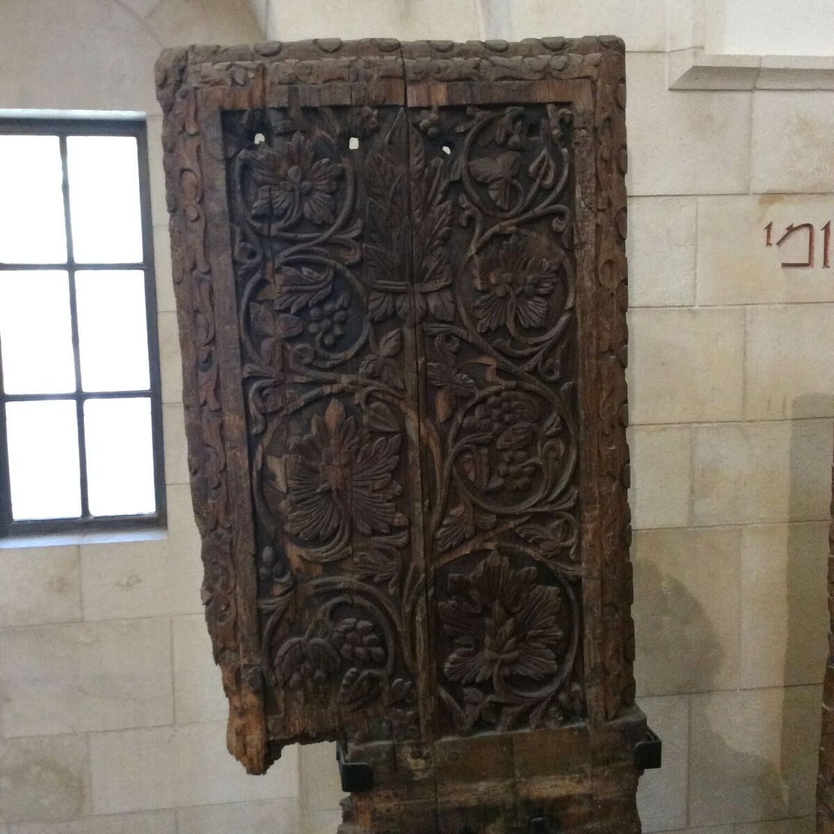 panneau en bois mosquée el-Aqsa 8ème siècle av. J.C. Jérusalem